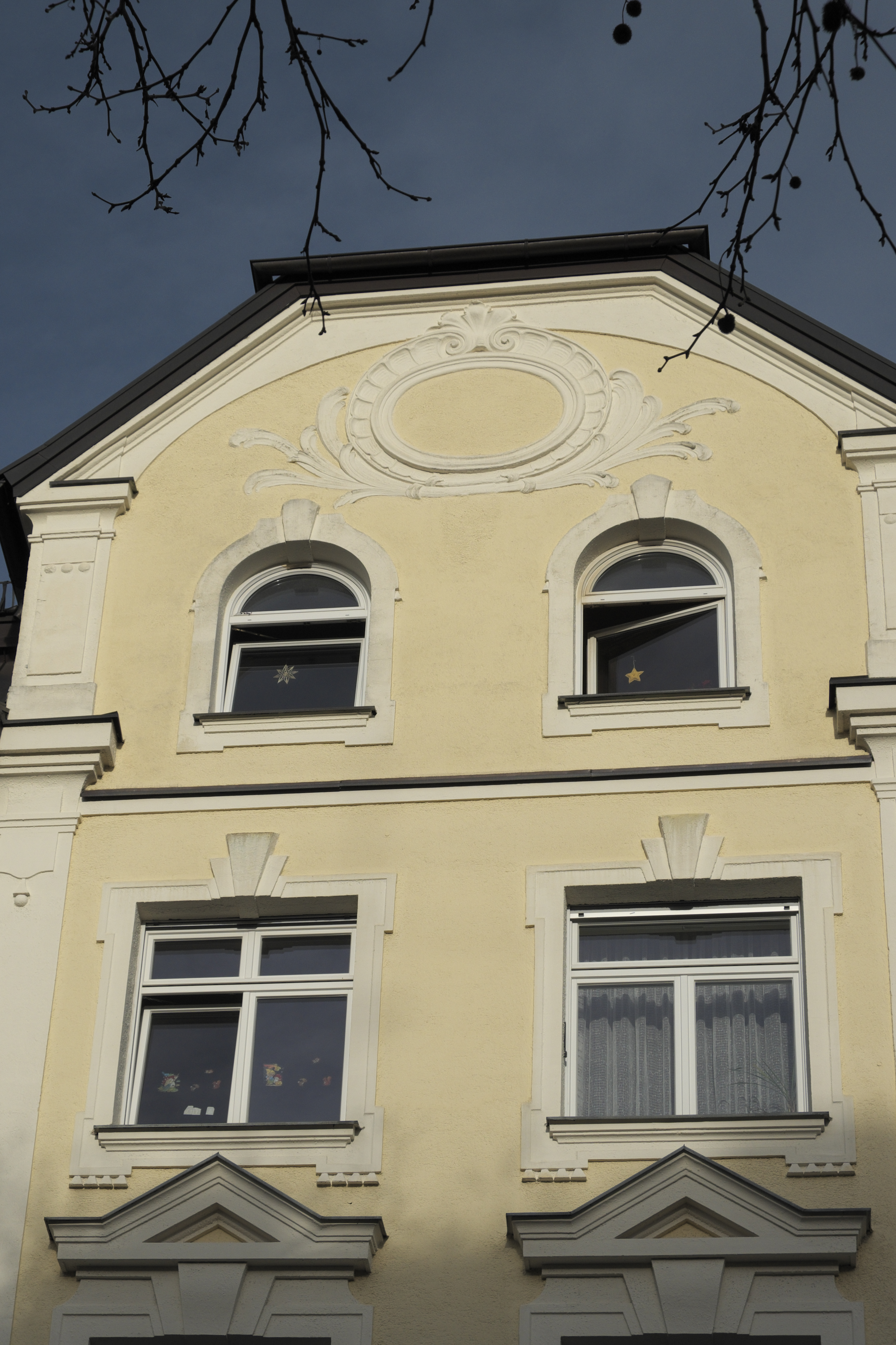 Mietshaus in der Volkartstraße 2 in Neuhausen im Stadtbezirk Neuhausen-Nymphenburg in München (Bayern/Deutschland), um 1900, Giebel